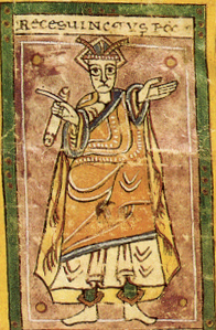 Reyes visigodos: Recesvinto. Según Códice Albeldense o Vigilano detalle del folio 428 del mismo.